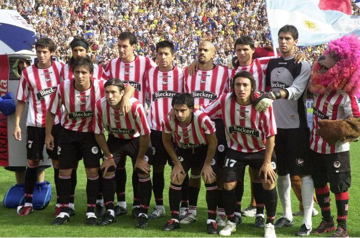 El equipo de Estudiantes de La Plata que derrotó a Boca Juniors en la final del Torneo Apertura 2006, el 13 de diciembre de ese año, en el estadio de Vélez. Arriba: José Sosa, Marcos Angeleri, Agustín Alayes, Diego Galván, Juan Sebastián Verón, Fernando Ortiz y Mariano Andújar; abajo: Pablo Alvarez, Mariano Pavone, Rodrigo Braña y Pablo Lugüercio.